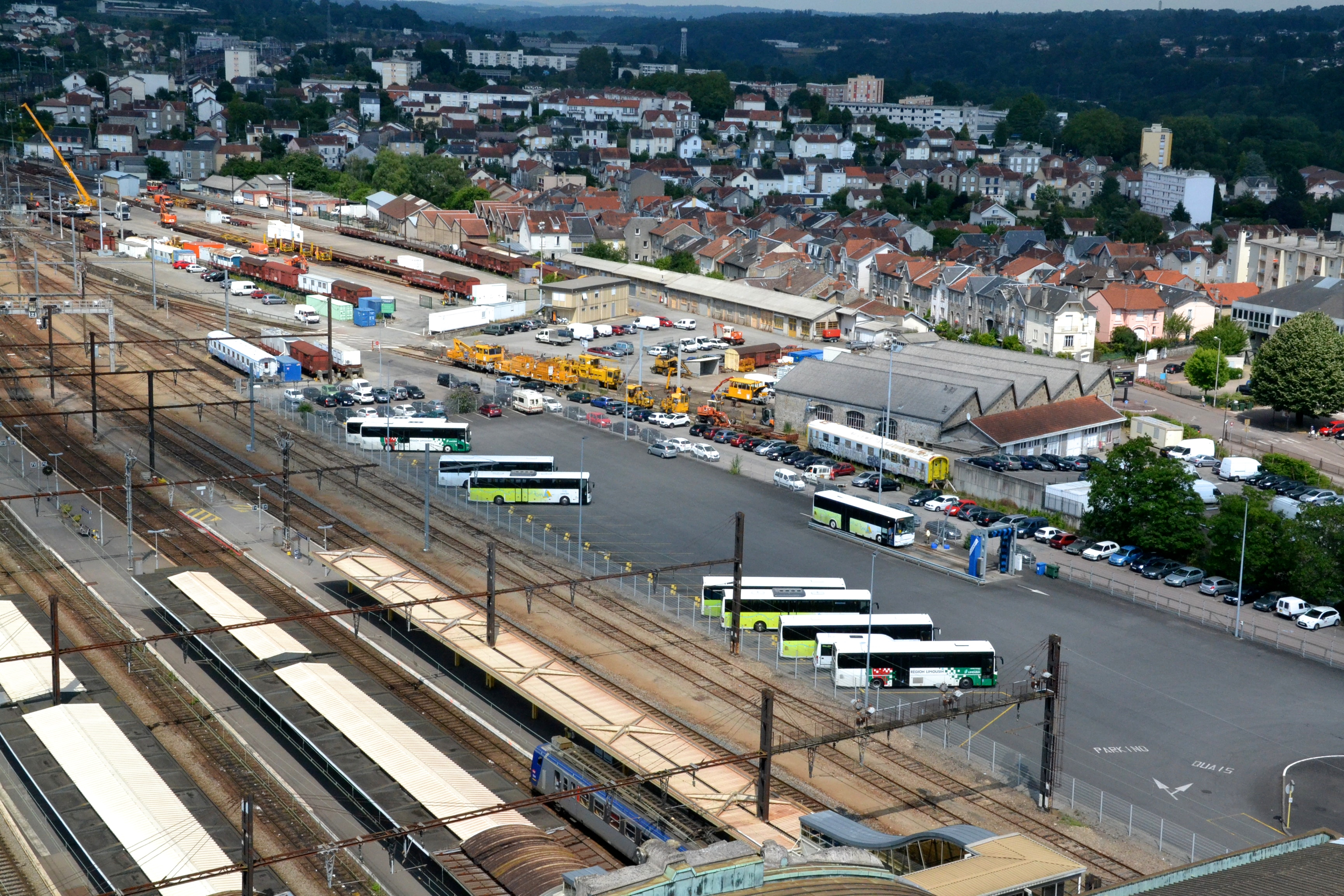 Vue sur les voies ferrées et le parking de la gare routière de Limoges (Centre intermodal d'échanges).